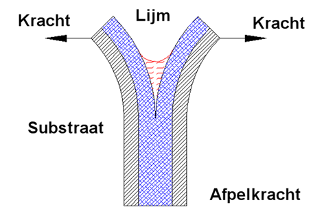 Beschrijving van het pelmechanisme. Description of the peeling process. aug. 2005 Laurensvanlieshout